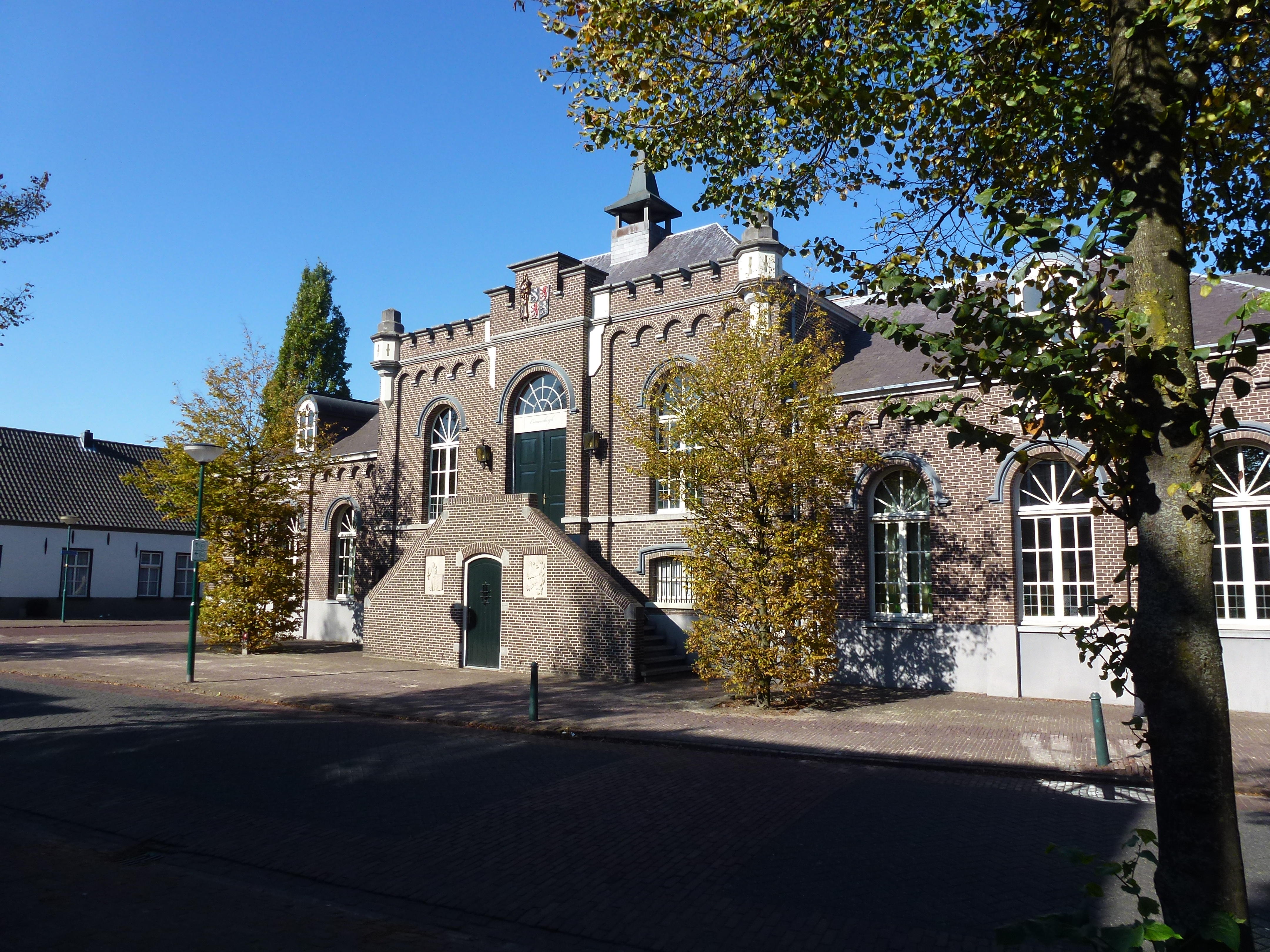 Voormalige Raadhuis Dorpsstraat 1 Aarle-Rixtel